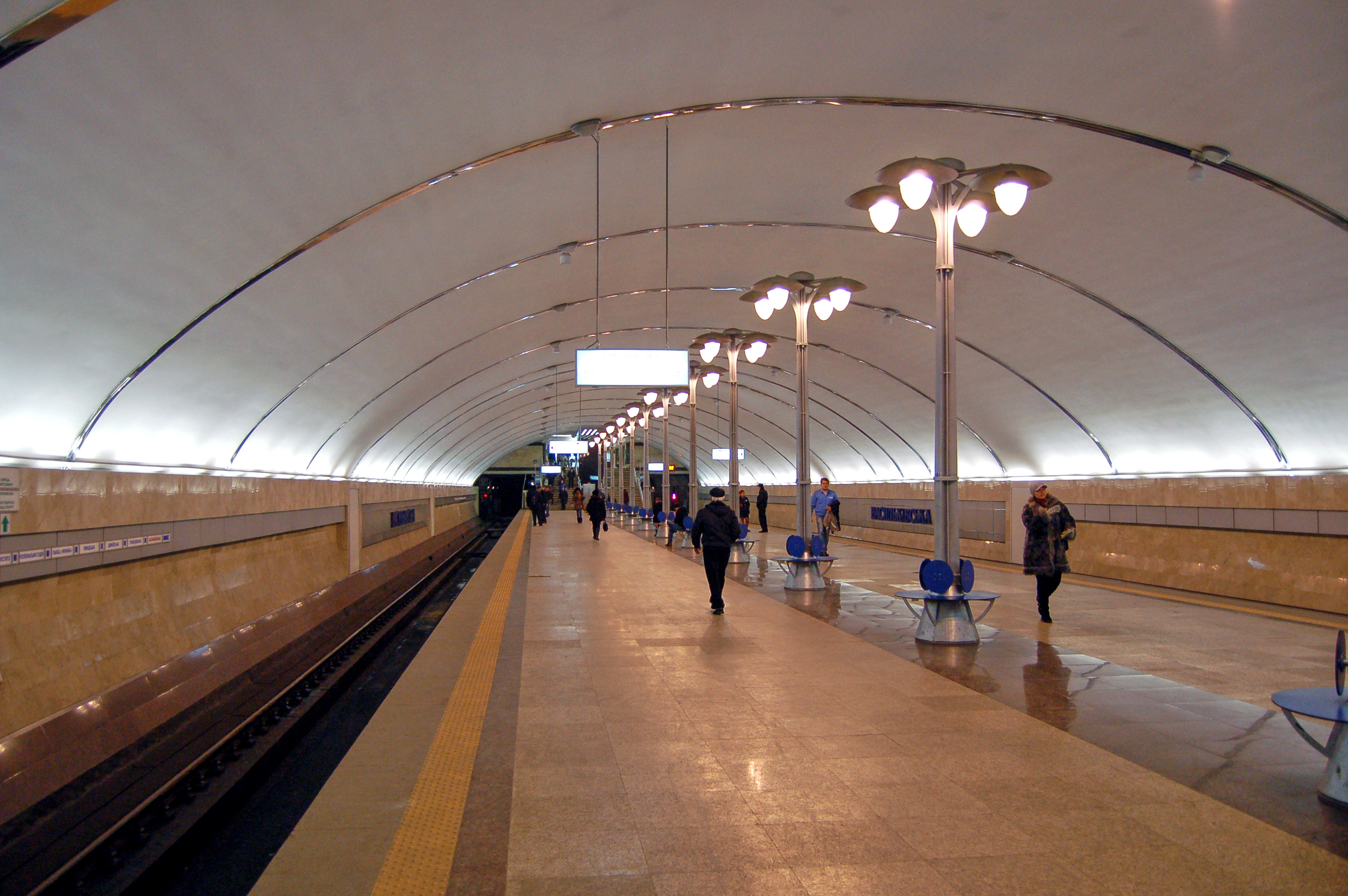 Cтанция метро «Васильковская», центральный зал